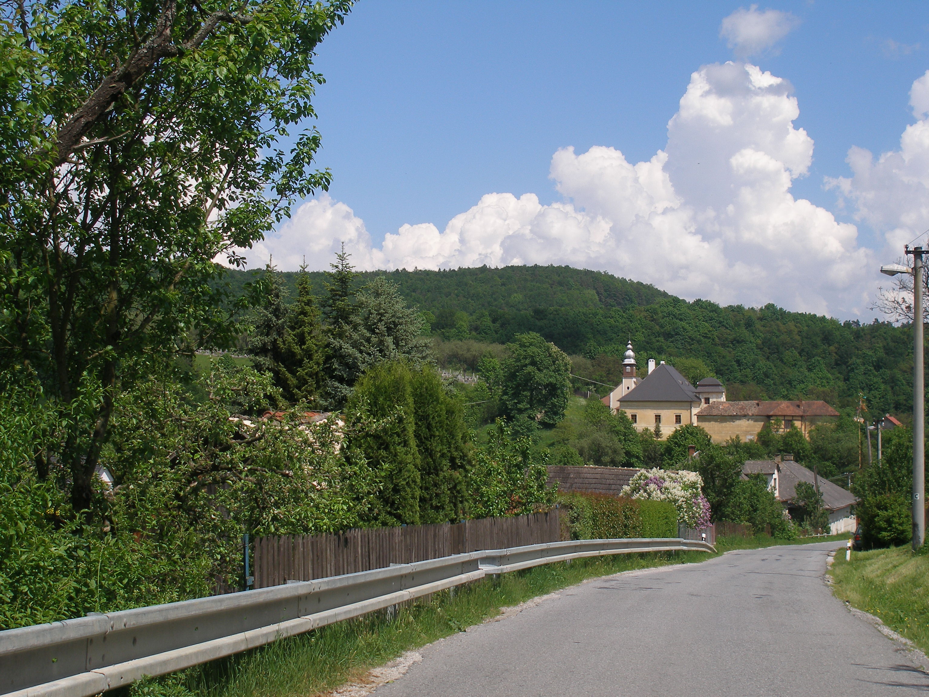 Obec Žipov, okres Prešov, región Šariš.